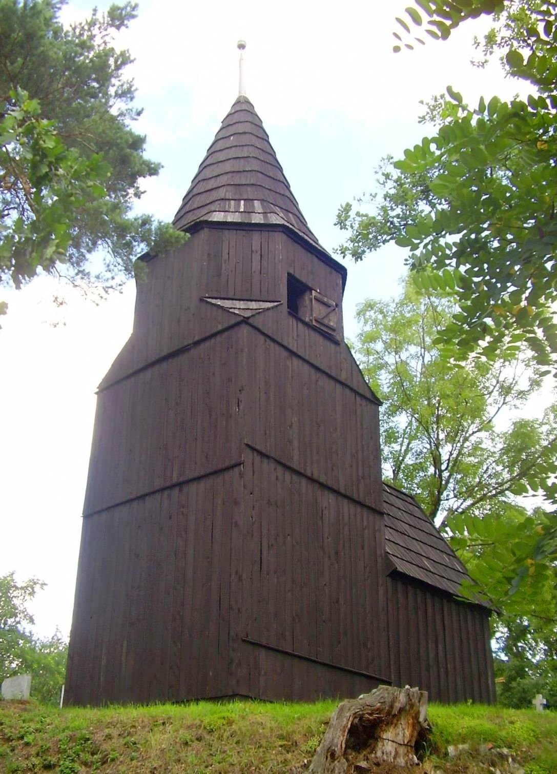 Łężyca - kaplica cmentarna (z dzwonnicą), drewn., 1727